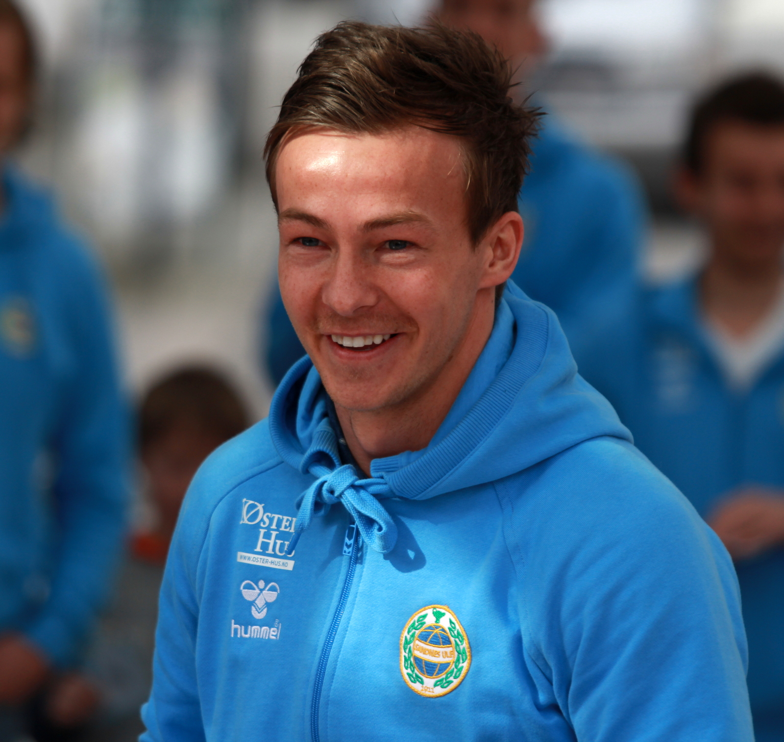 Steven Lennon foran 2014 sesongen for Sandnes Ulf